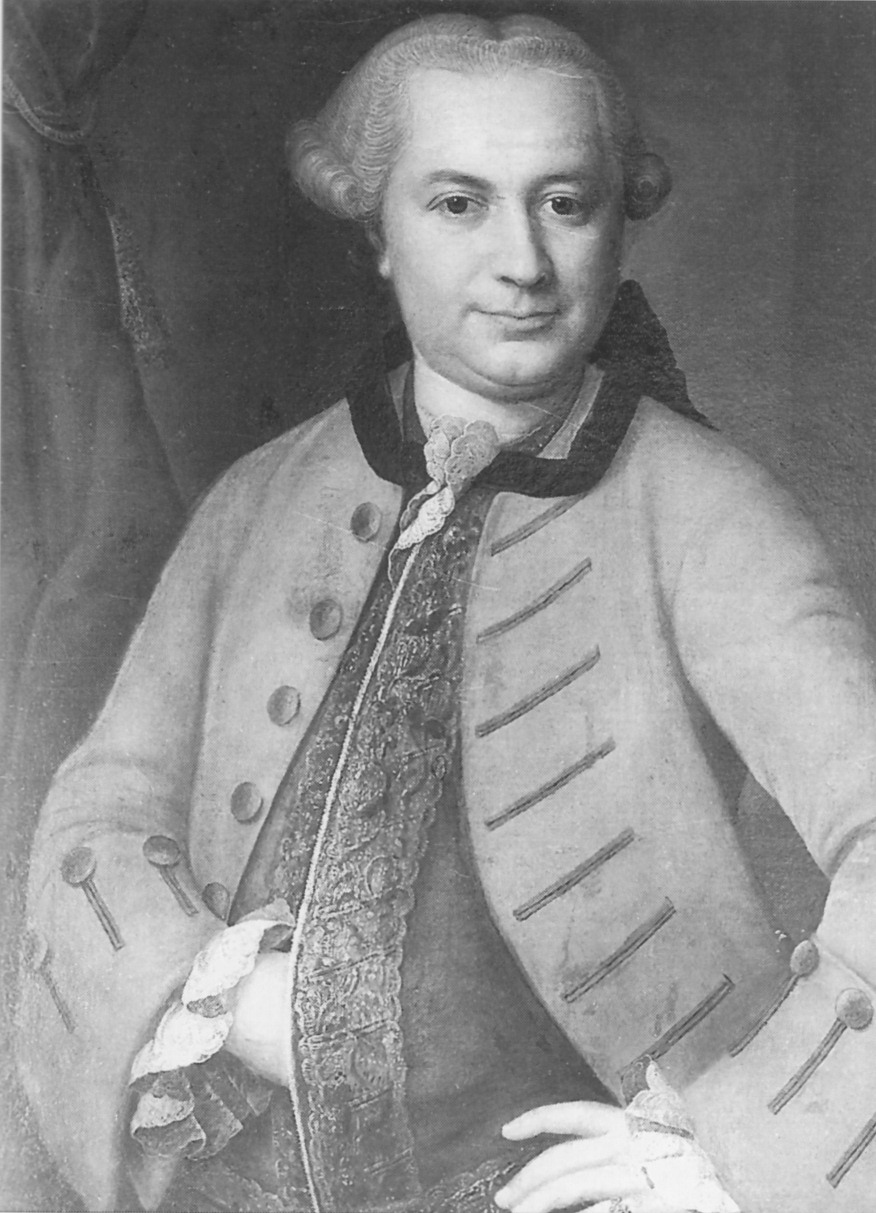 Porträt Friedrich von der Leyens (1732-1787)